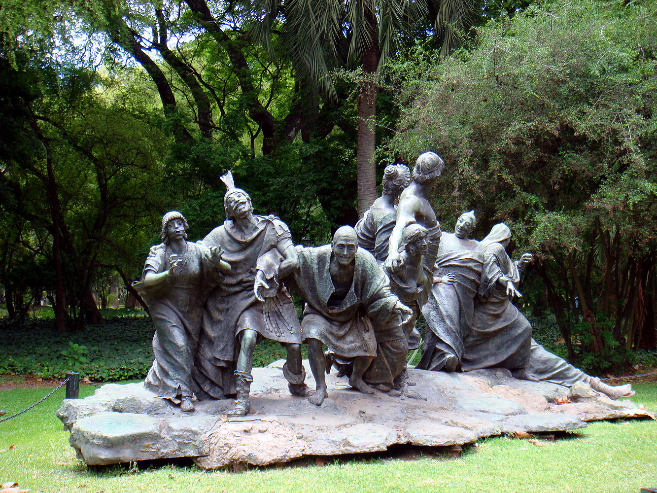 Estatua en Jardín Botánico